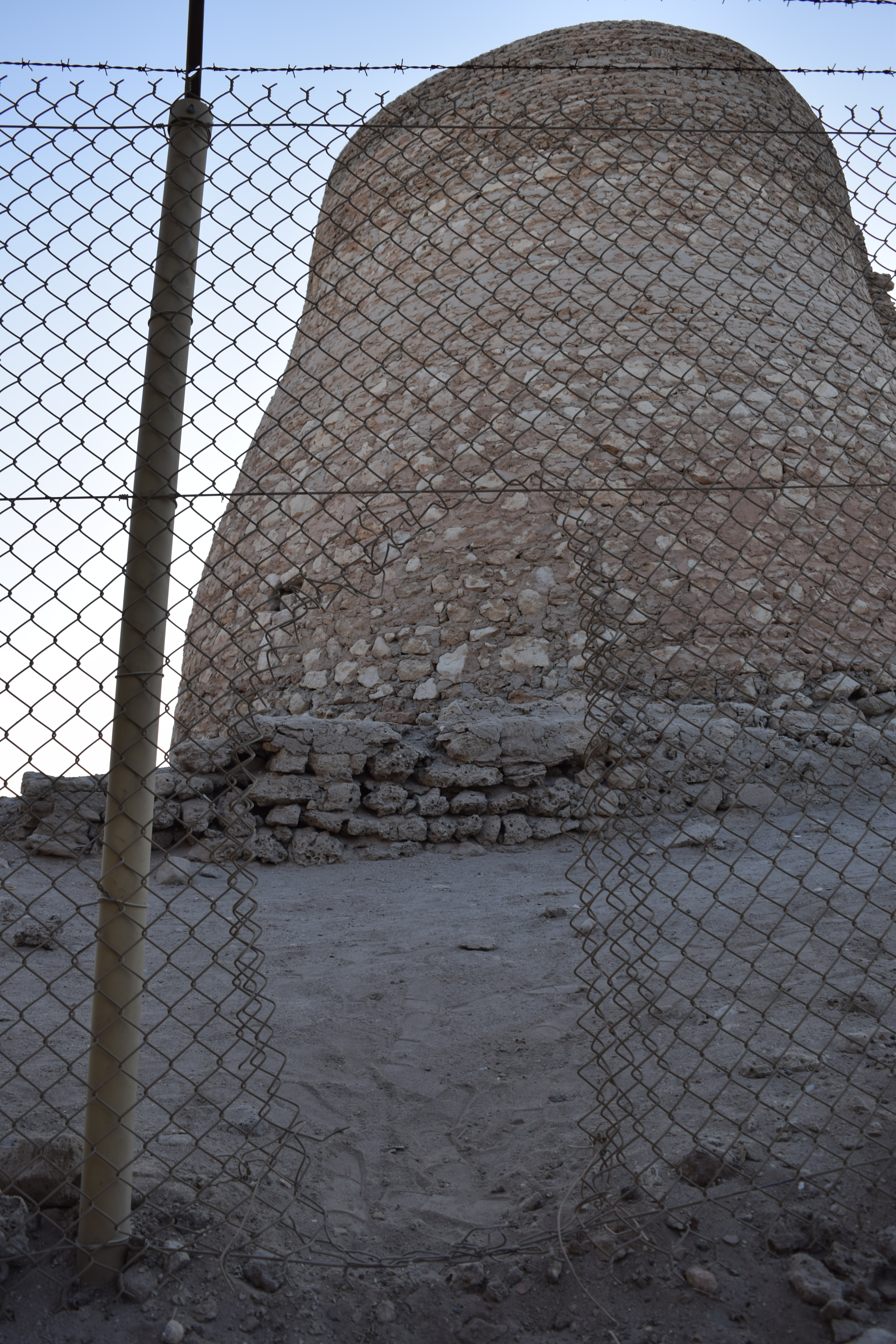 تسوير قلعة تاروت وإغلاقها عن السياح